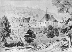 Das ehemalige Kartäuserkloster Le Glandier in Beyssac, Départment Corrèze.